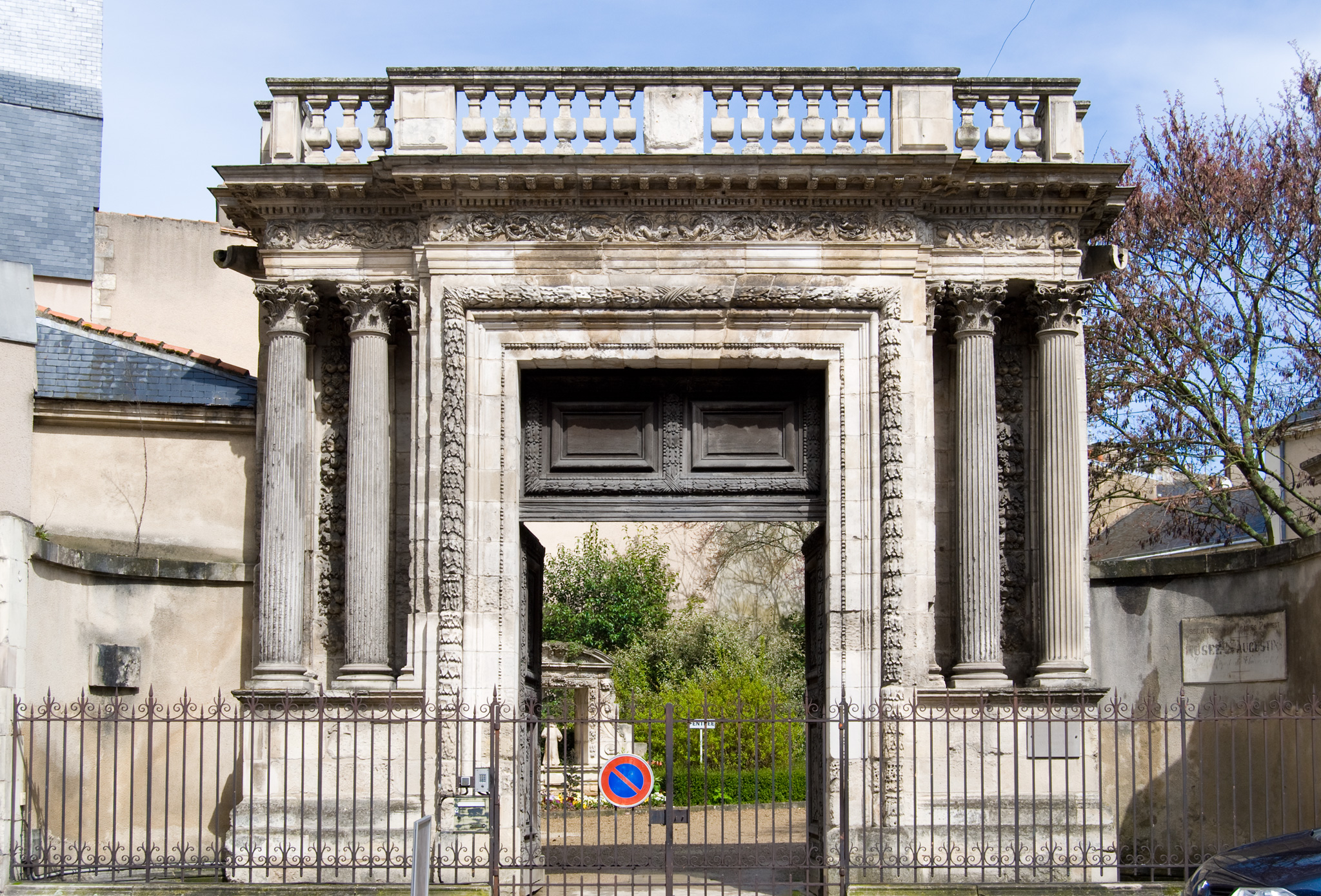 Entrée du musée de Chièvres, 9, rue Victor Hugo, Poitiers ; le portail est celui de l’ancienne église des Augustins, détruite pour la construction d’un grand magasin à l’emplacement de l’actuel Printemps.